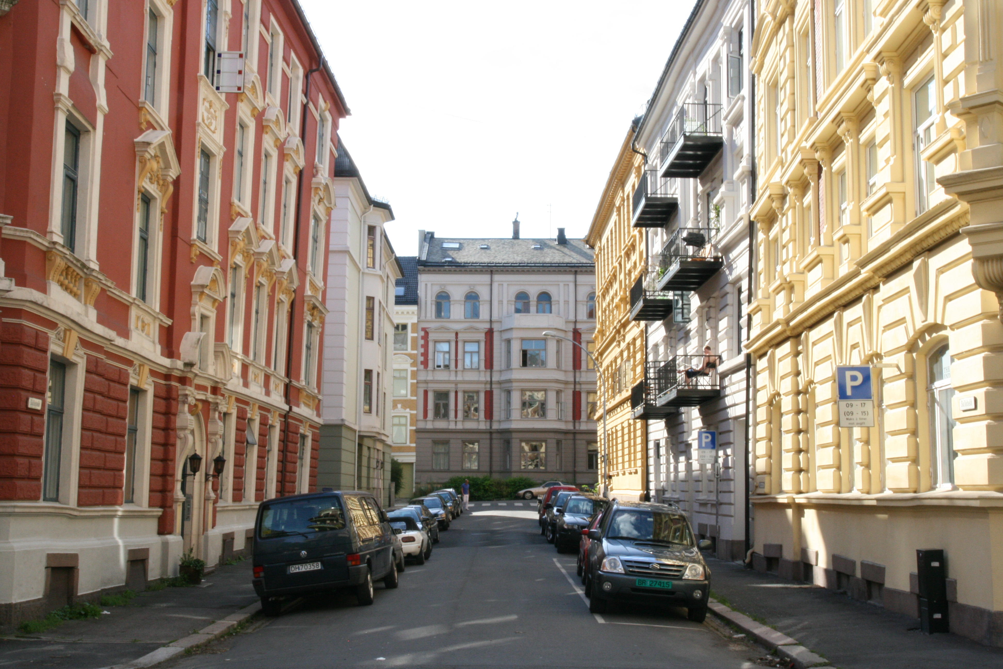 Gaten Skillebekk i Oslo, sett vestover fra Niels Juels gate